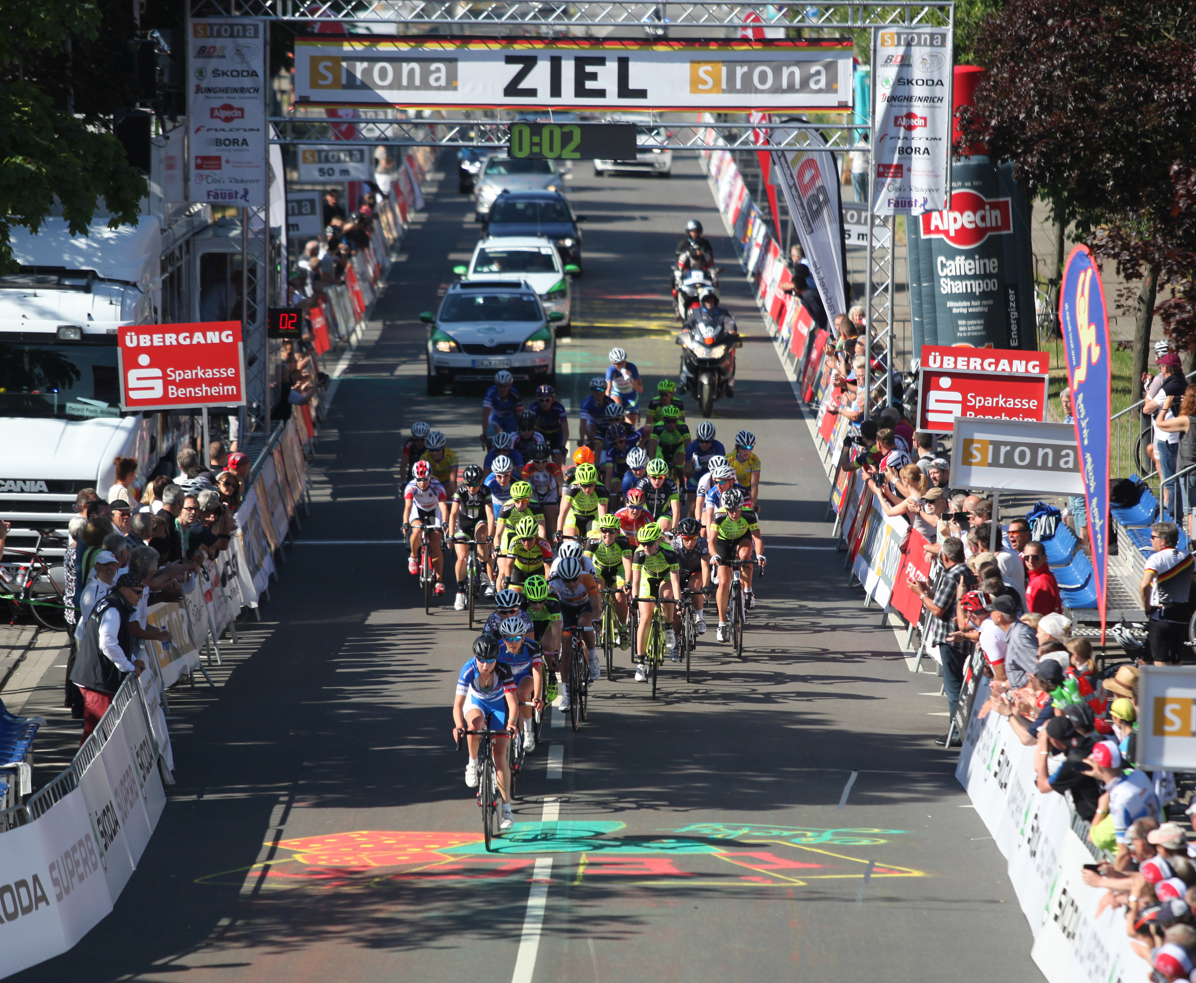 Foto von den Deutschen Meisterschaften im Straßenrennen der Frauen (Elite) am 28. Juni 2015 in Bensheim (Hessen)